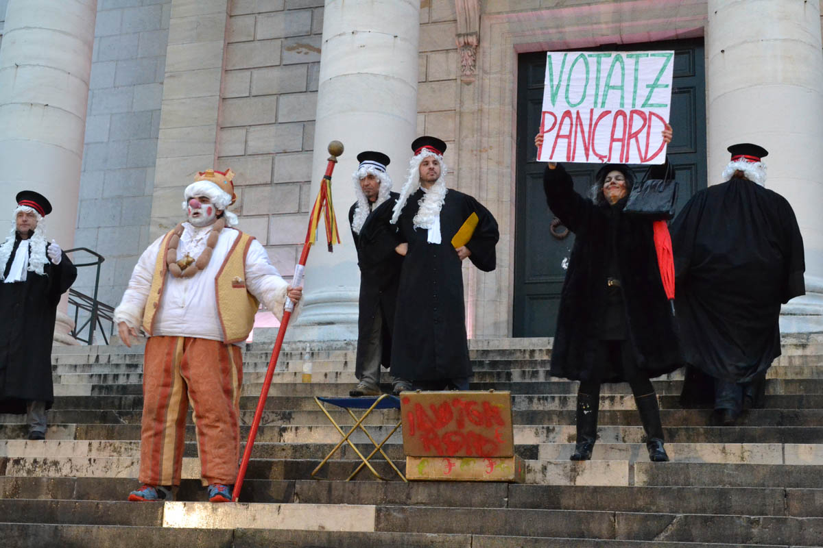 Le procès de Sent Pançard au Carnaval Biarnes de Pau